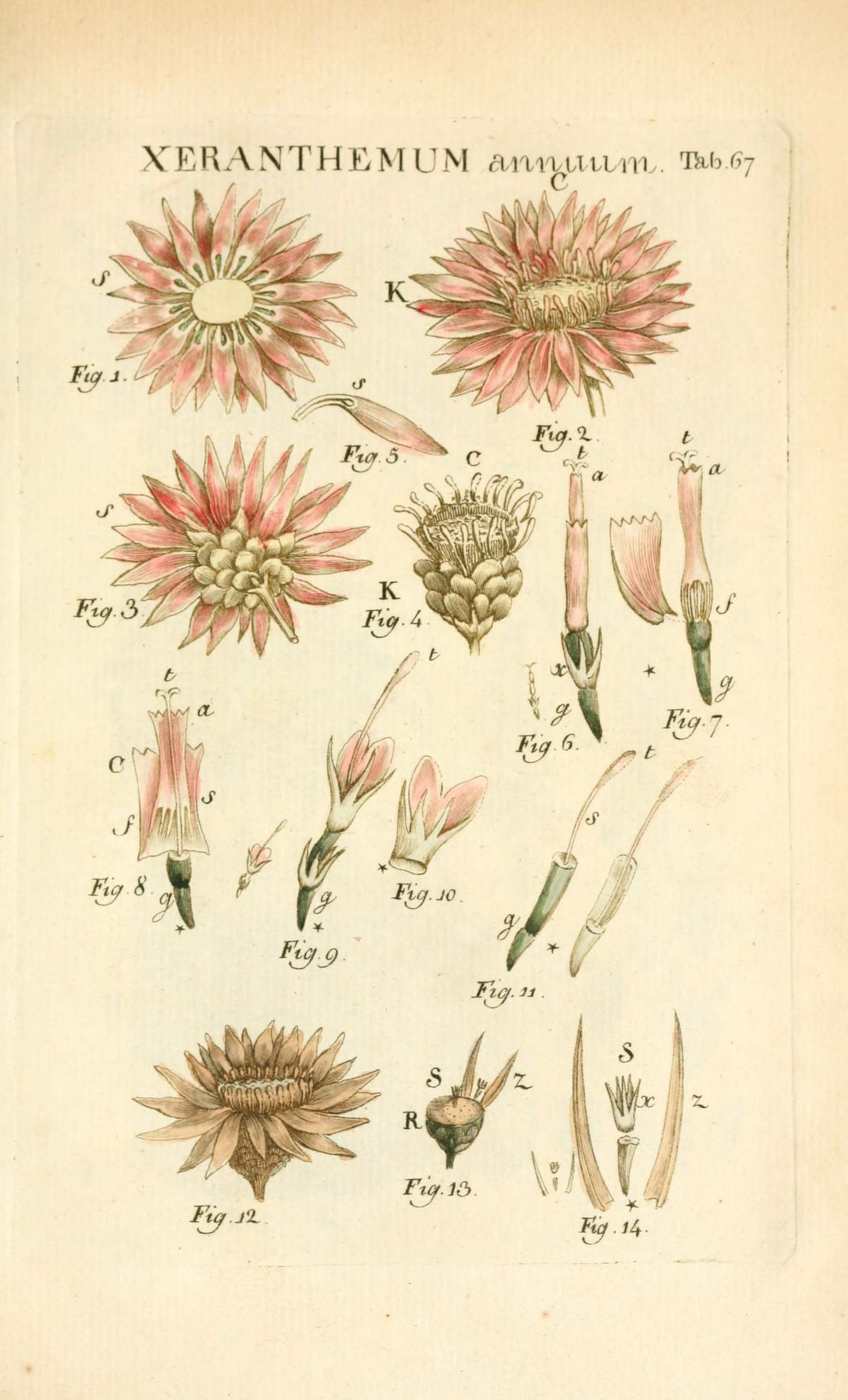 XERANTHEMUM am-^uxtm. w^r,j I^.JZ